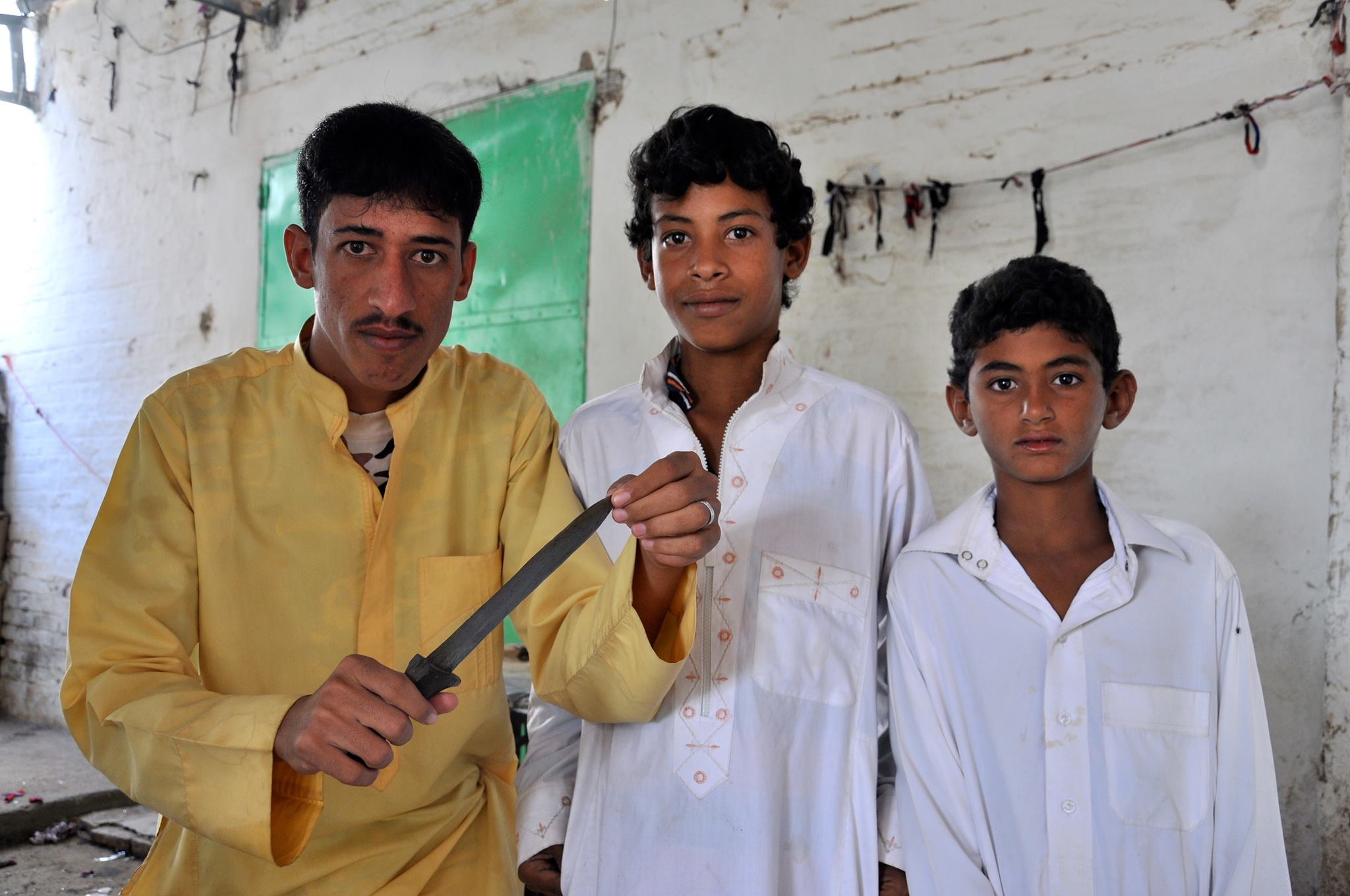 Drei Angehörige des Rashaida-Stammes im sudanesischen Kassala